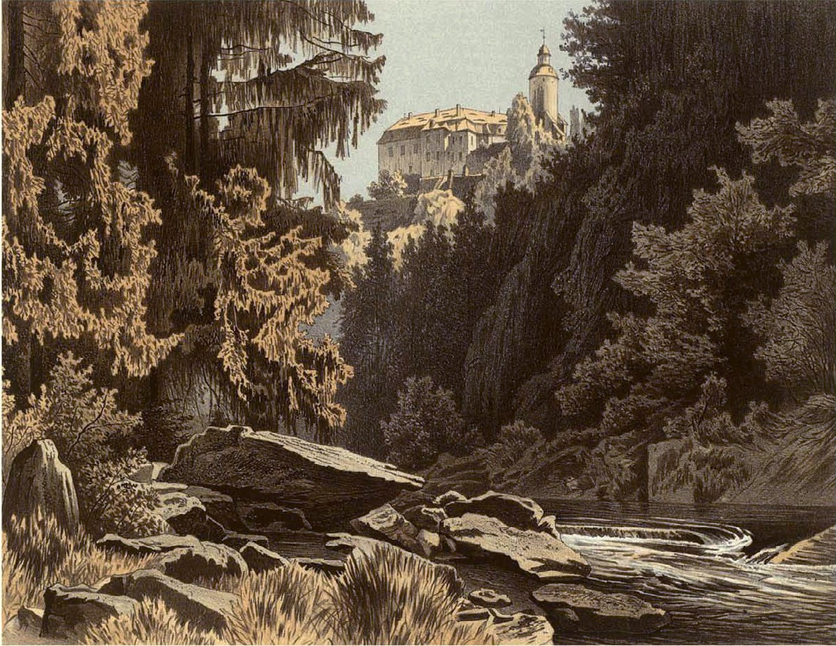 Burg Tzschocha, Kreis Lauban, Lithographie aus der Sammlung Duncker